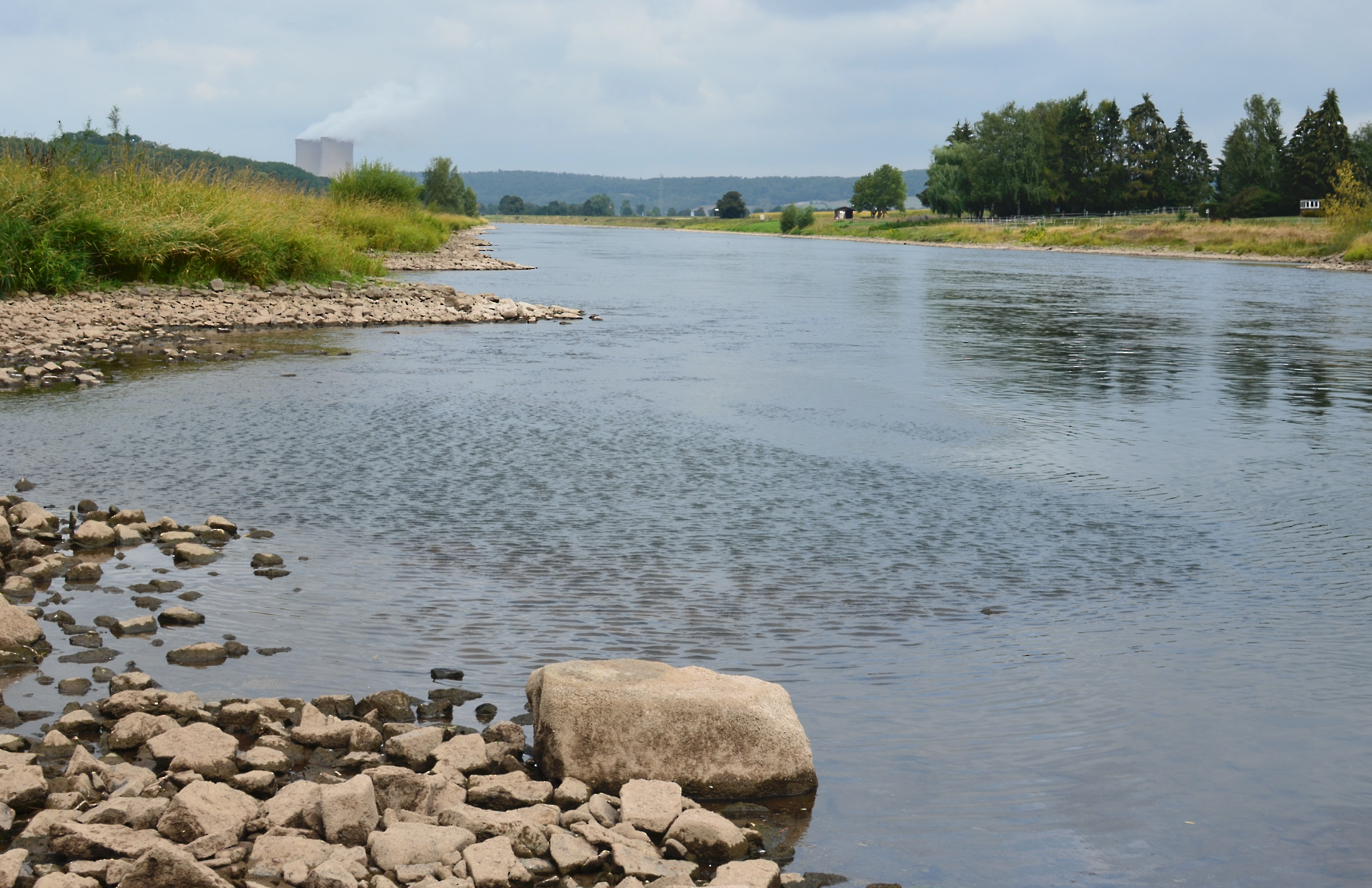 Großer Stein am Hajener Hungerstein am westlichen Weserufer